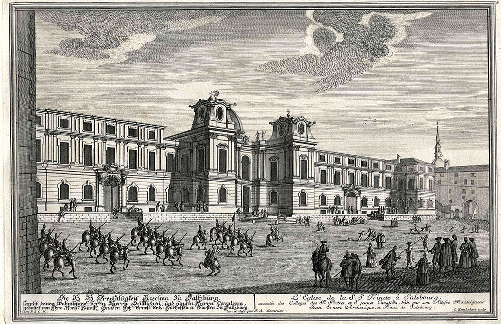 Salzburg, H. H. Dreifaltigkeitskirche, aus: Die Saltzburgische Kirchen-Prospect. Augsburg, 1735. Exemplar der Universitätsbibliothek Salzburg, G 500 I